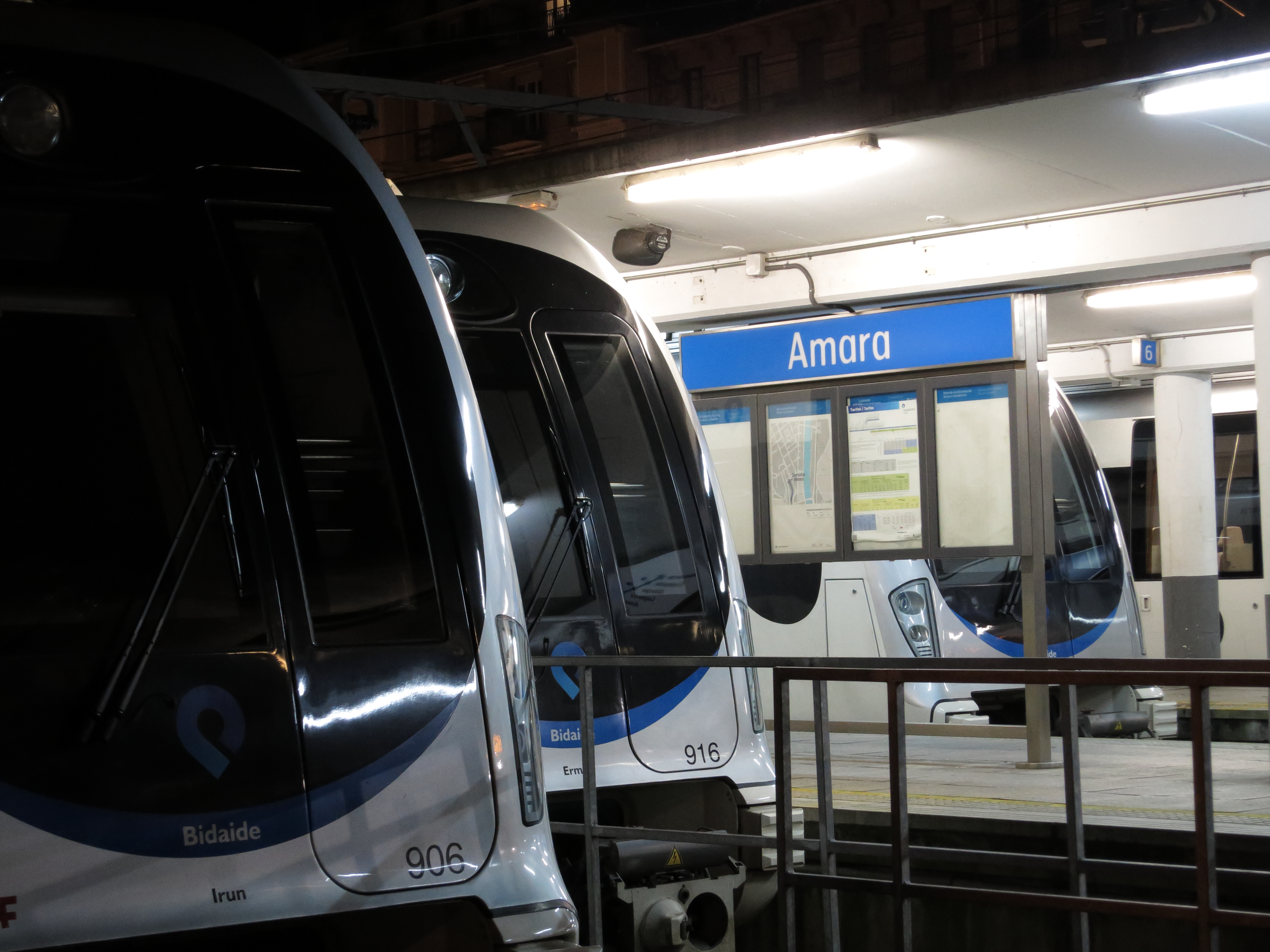 Trenes en la estación de Amara